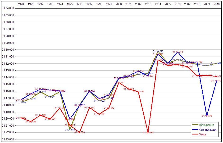 Сравнительный график времен на круге трассы Интерлагос за 1990-2010 годы.